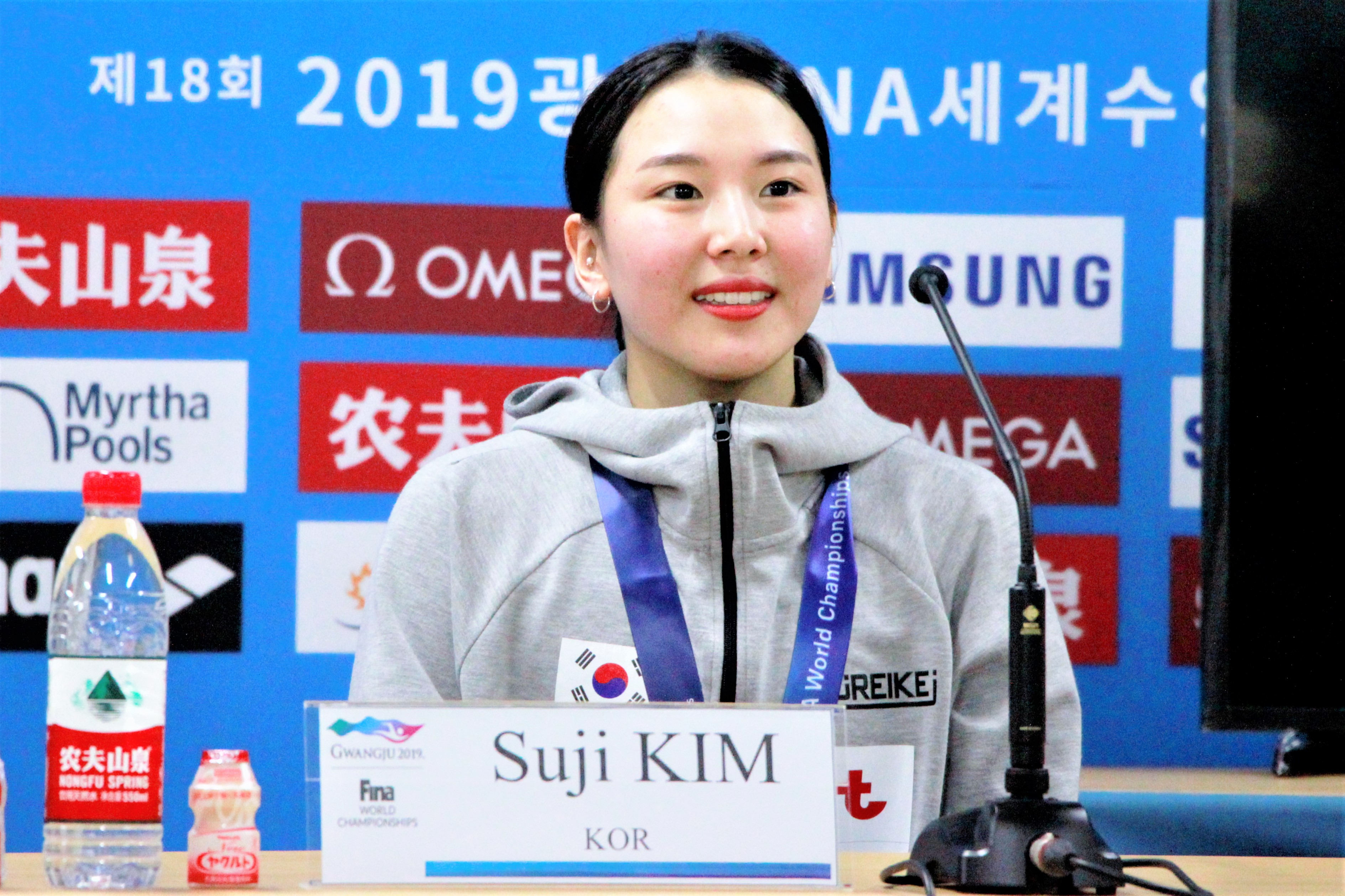 2019 광주 세계 수영선수권대회에 참가하여 동메달을 획득한 김수지 선수.